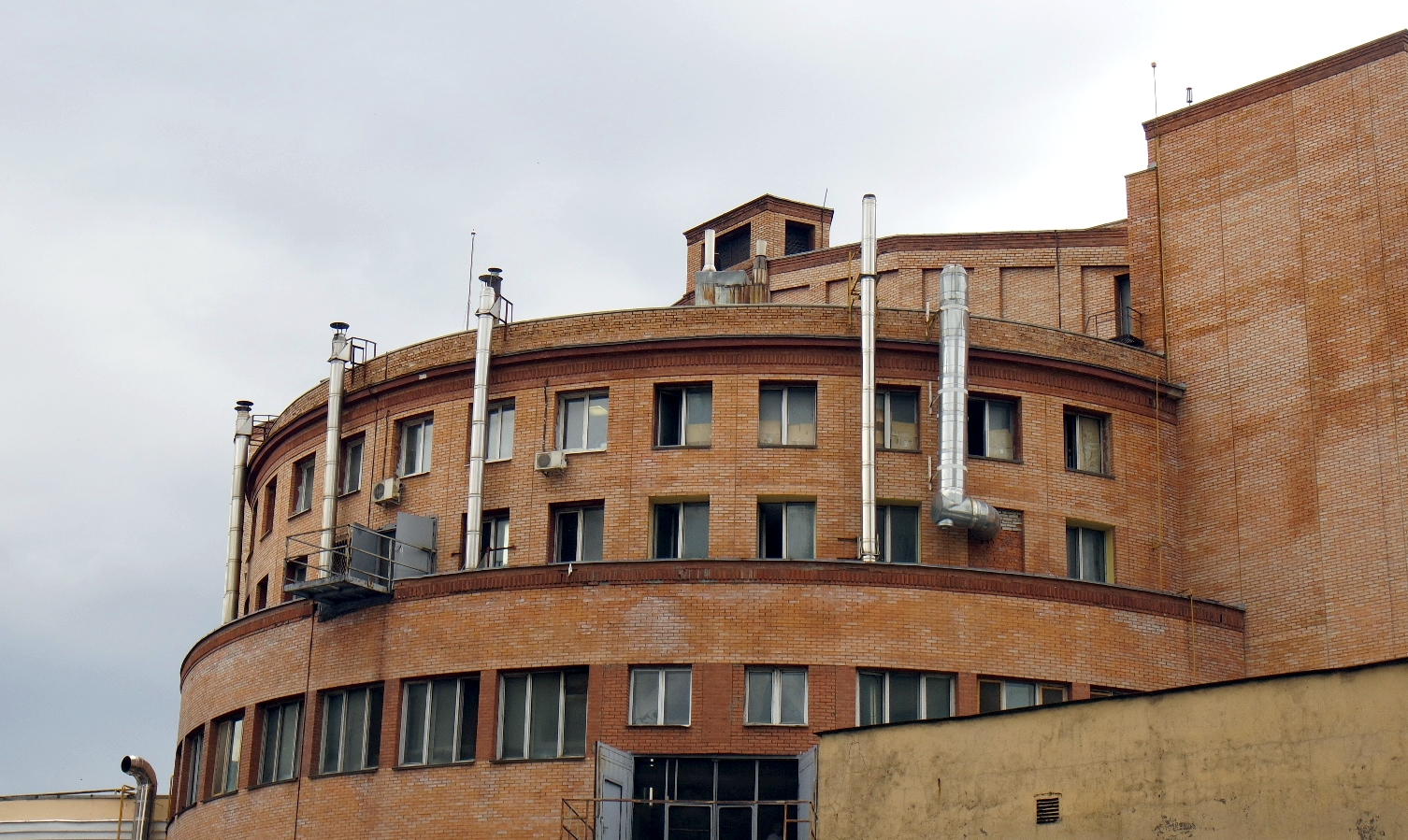 Zvyozdny combine (Fazer Moscow site), roundhouse mechanized bakery built in 1937